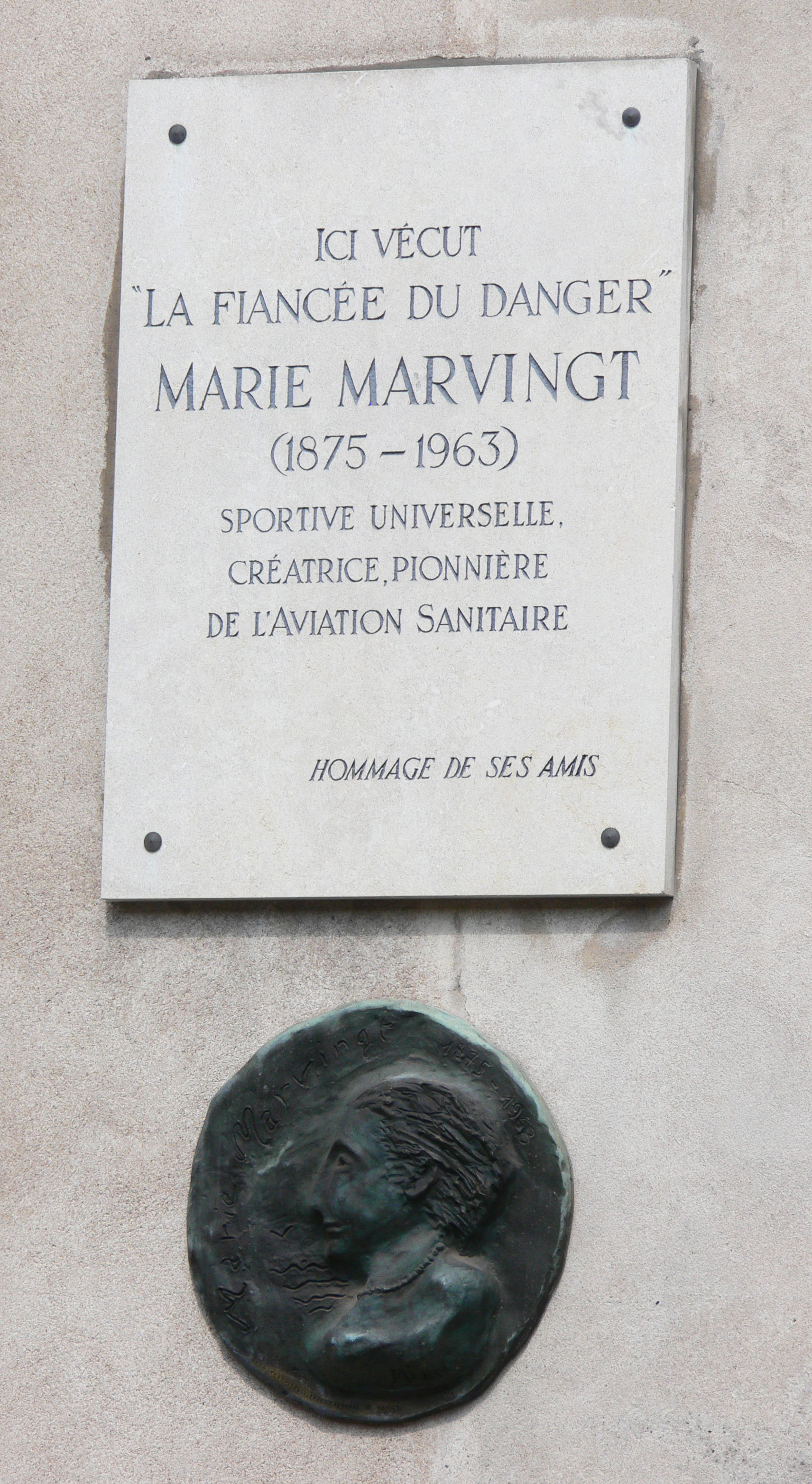 Nancy. Immeuble, 8 place de la Carrière (Inscrit, 1925) .